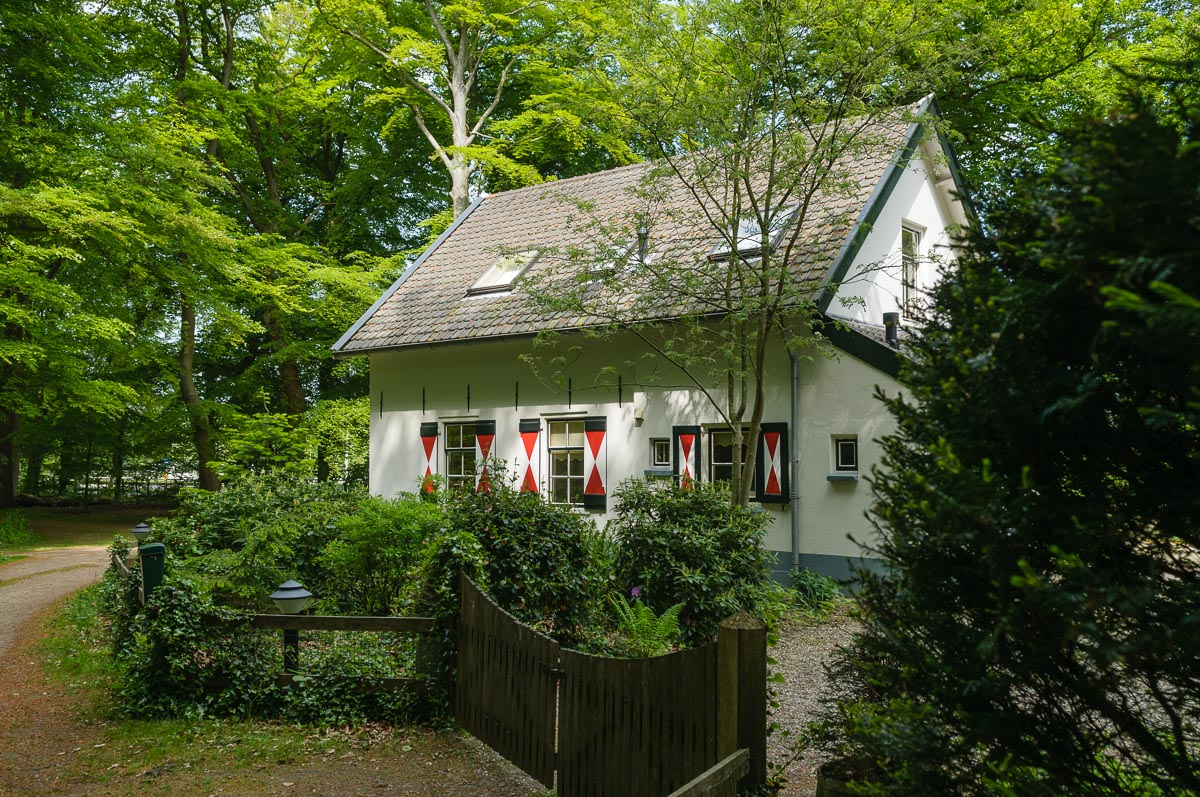 Landgoed Bantam, boswachterswoning aan de Franse Kampweg. Hilversum/Wijdemeren, Noord Holland, Nederland.